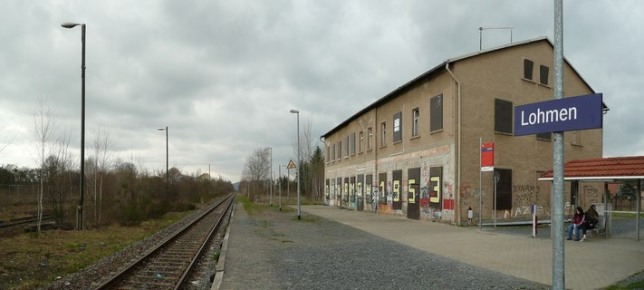 Lohmen: Blick auf den Bahnhof